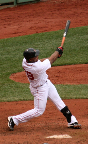 Adrián Beltré